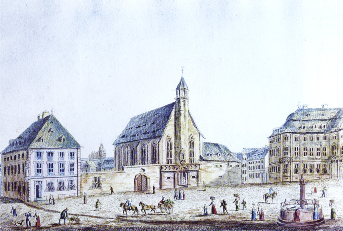 Das Kloster St. Agnes (1259 bis 1802) mit der Klosterkirche (Bildmitte) und dem angrenzenden Osteiner Hof (rechts) am Thiermarkt